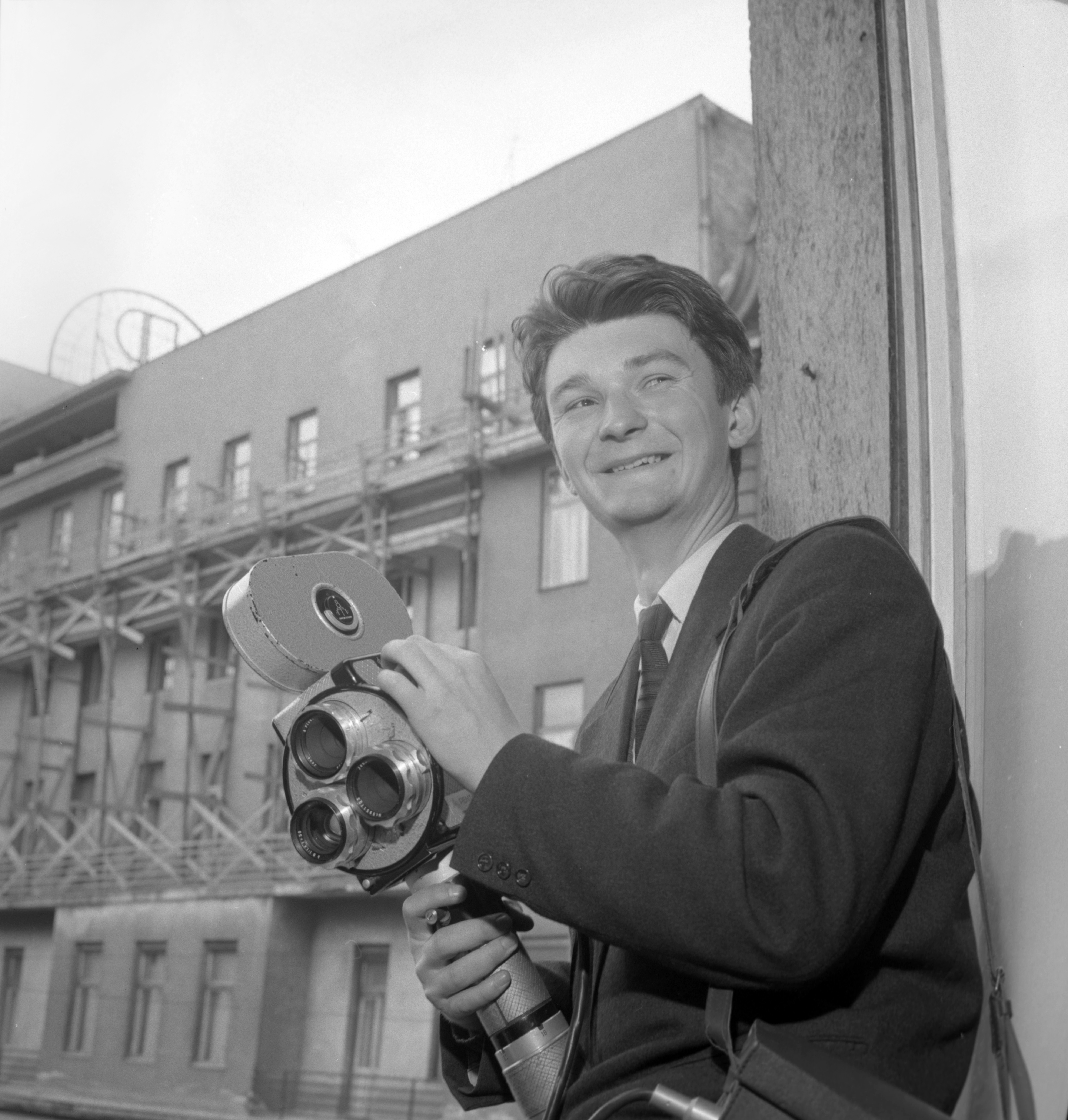 filmski snimatelj i audiovizualni arhivist